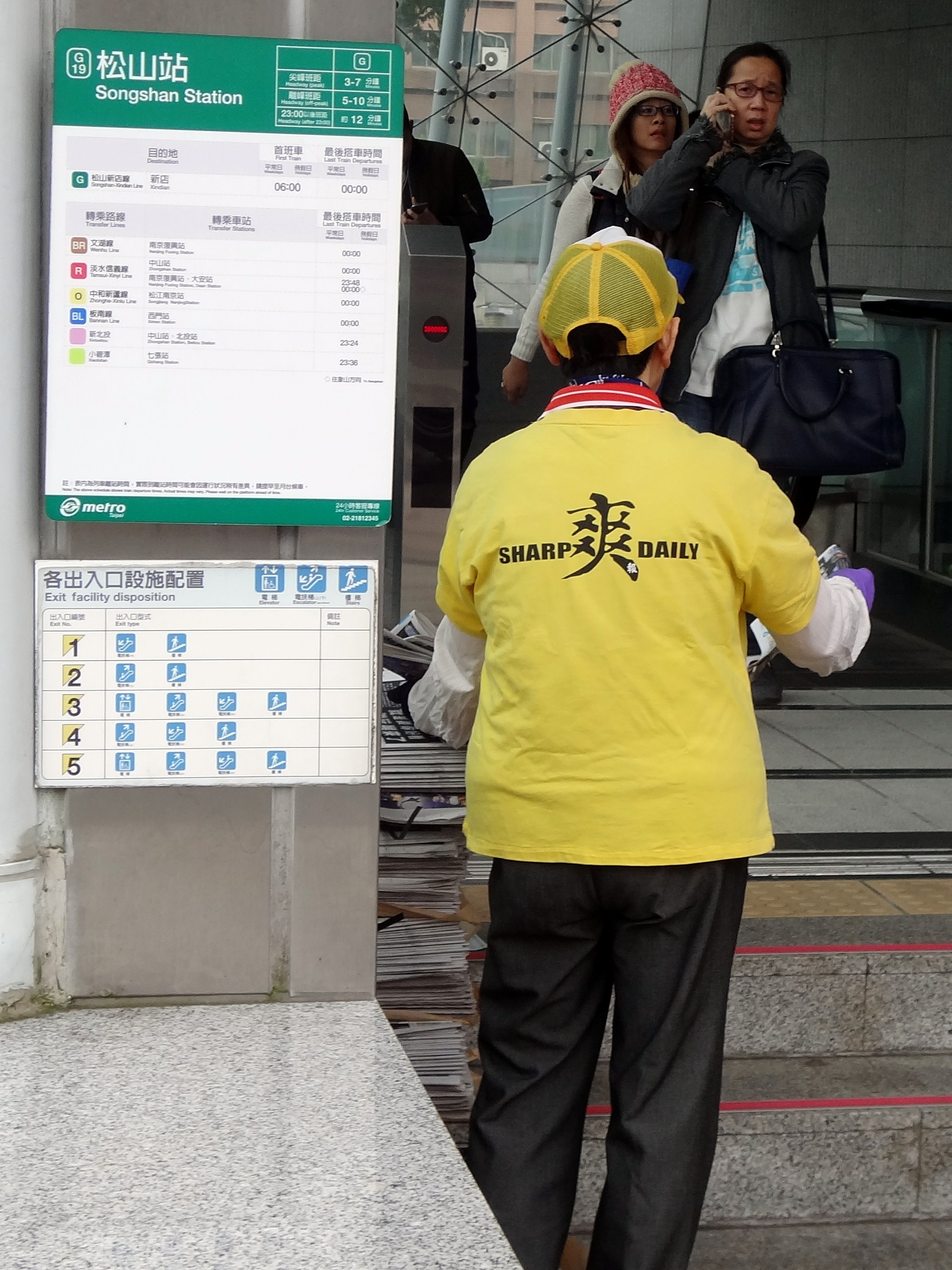 臺北捷運松山站3號出口前，《爽報》男性派報員工作中。